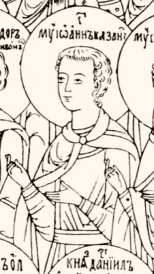 Иоанн Казанский (?, г. Нижний Новгород — 24 января /по ст. ст./ 1529 г., г. Казань) — русский православный святой, мученик. Фрагмент рисунка - перевода с иконы "Русские святые". Россия (1814 г.). (Лист 8. Музей СпбДА, табл. 63. Ретушировано.)